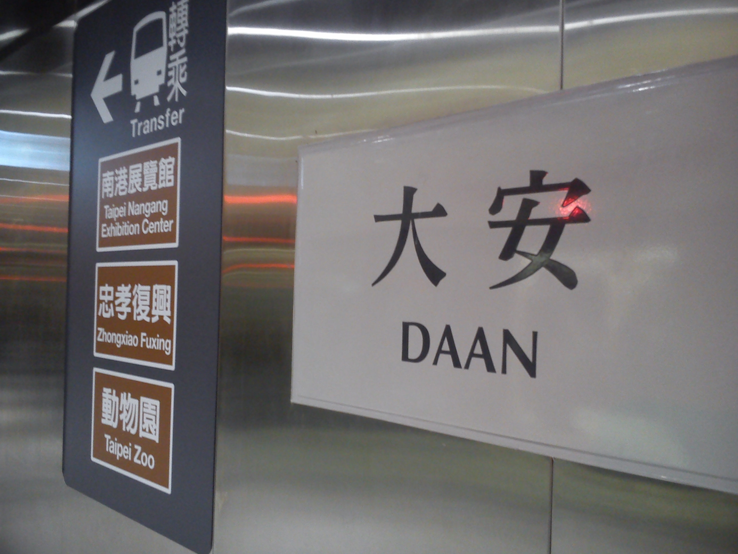 中文（台灣）: 台北捷運大安站信義線月台層的文湖線轉乘指引。